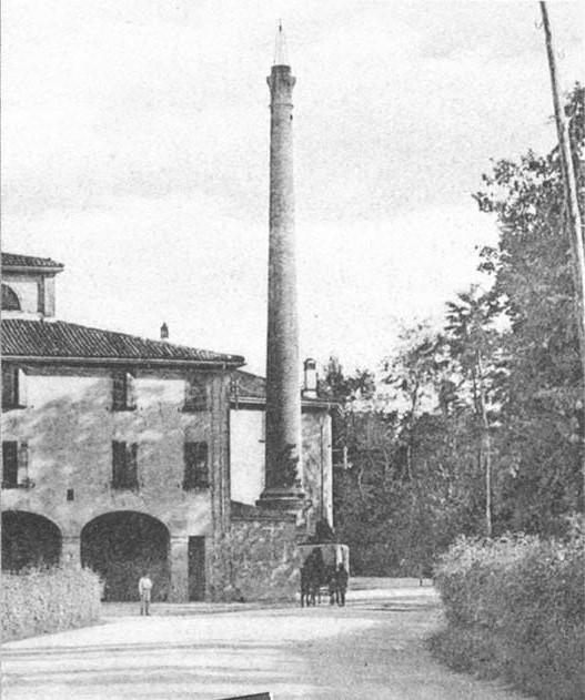 Foto del Molino Parisio (Bologna) all'inizio del XX secolo